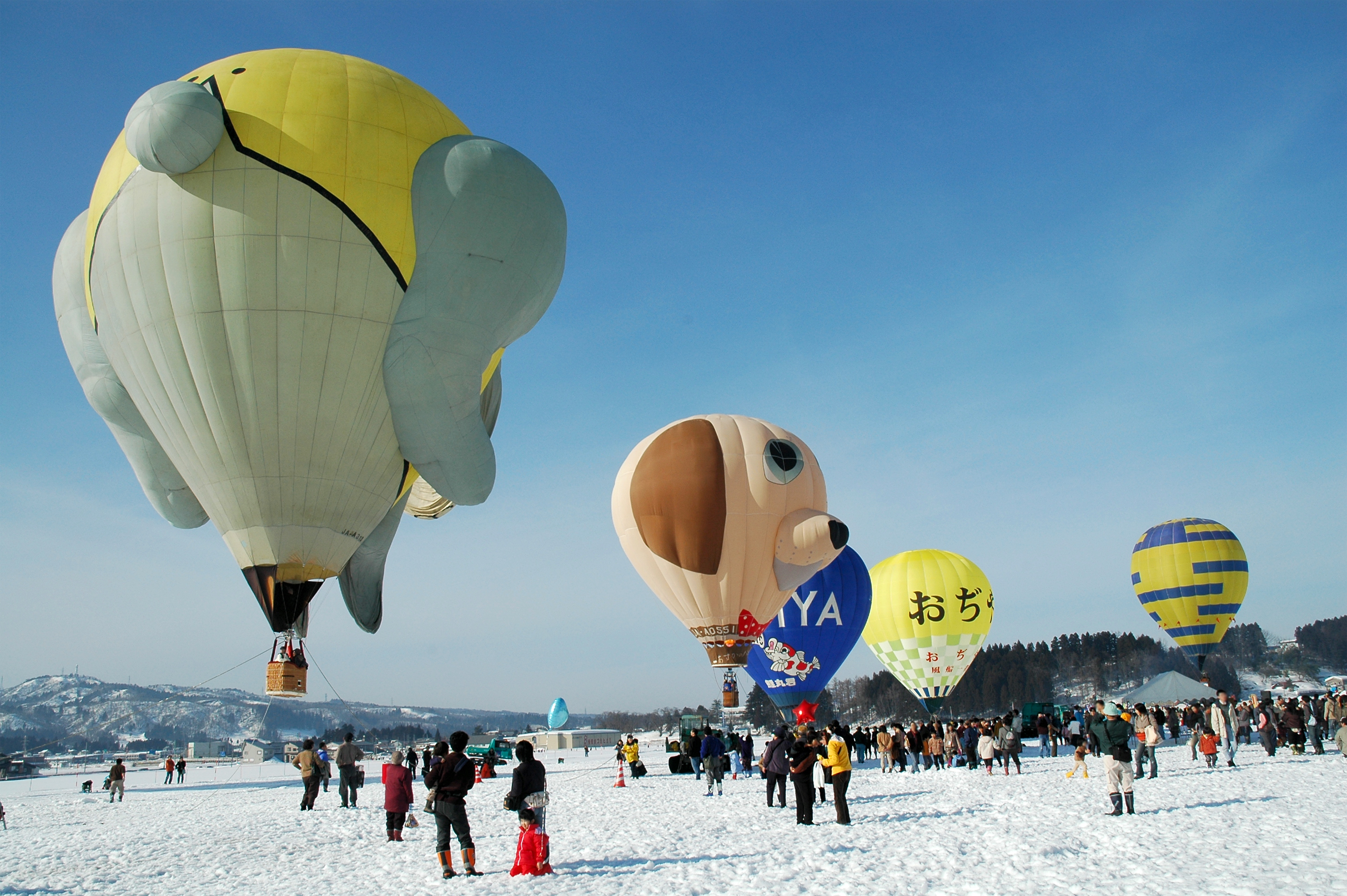 2006 Ojiya Balloon Festival (2006年おぢや風船一揆)